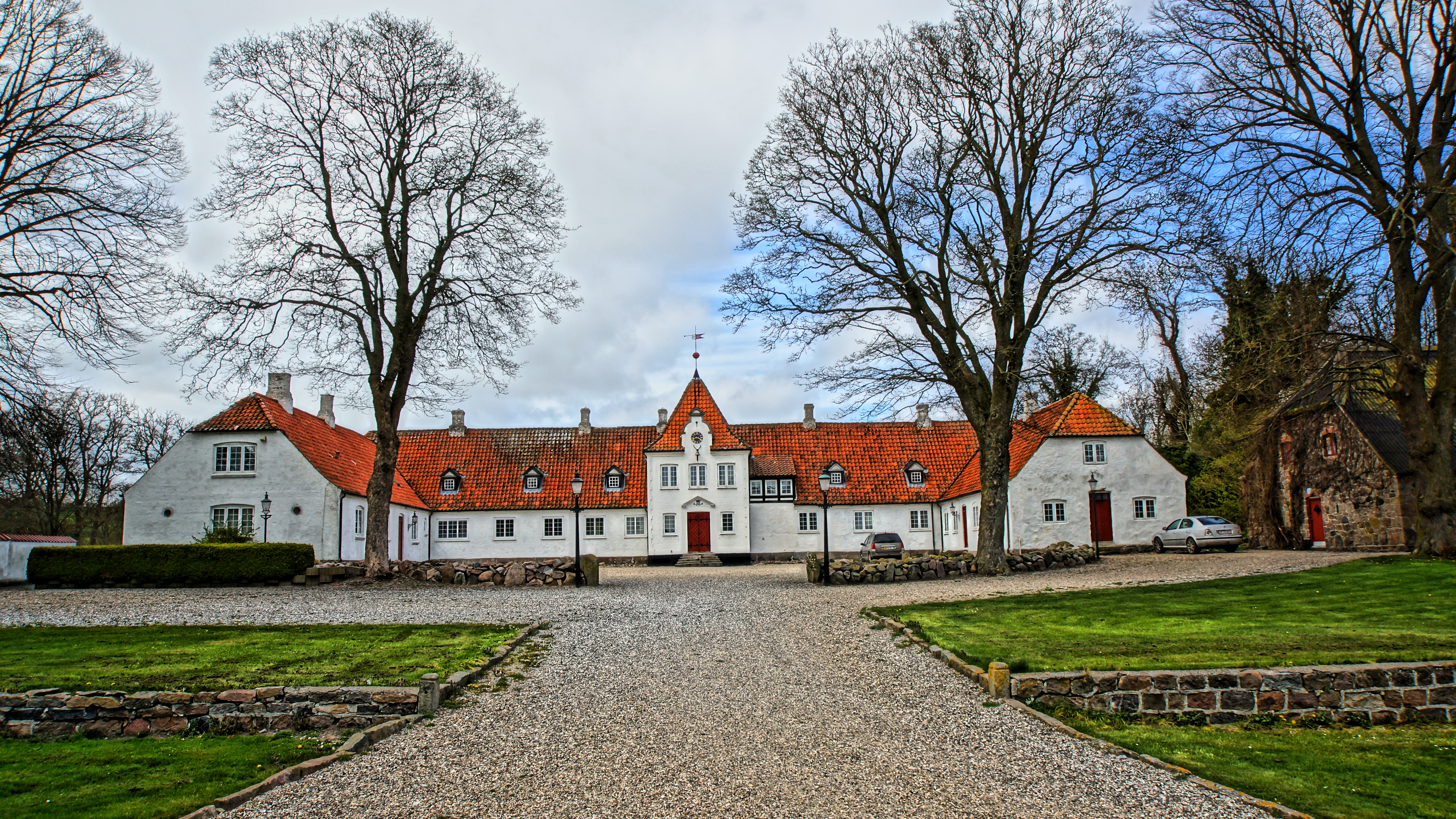 Isgård, forår 2015, ligger på Syddjursland, Mols Hoved.